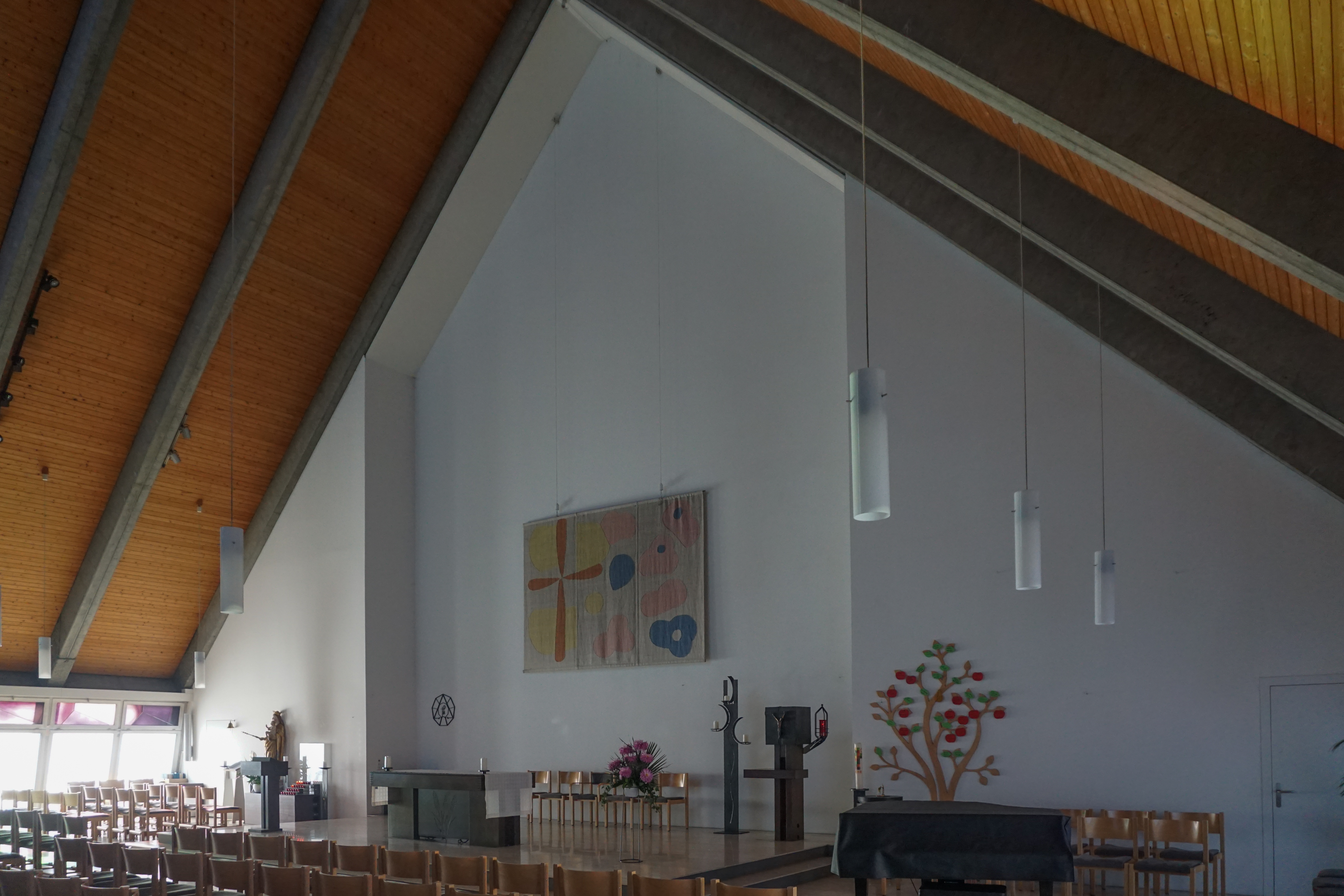 Die Heiliggeist-Kirche von Belp, Chorraum